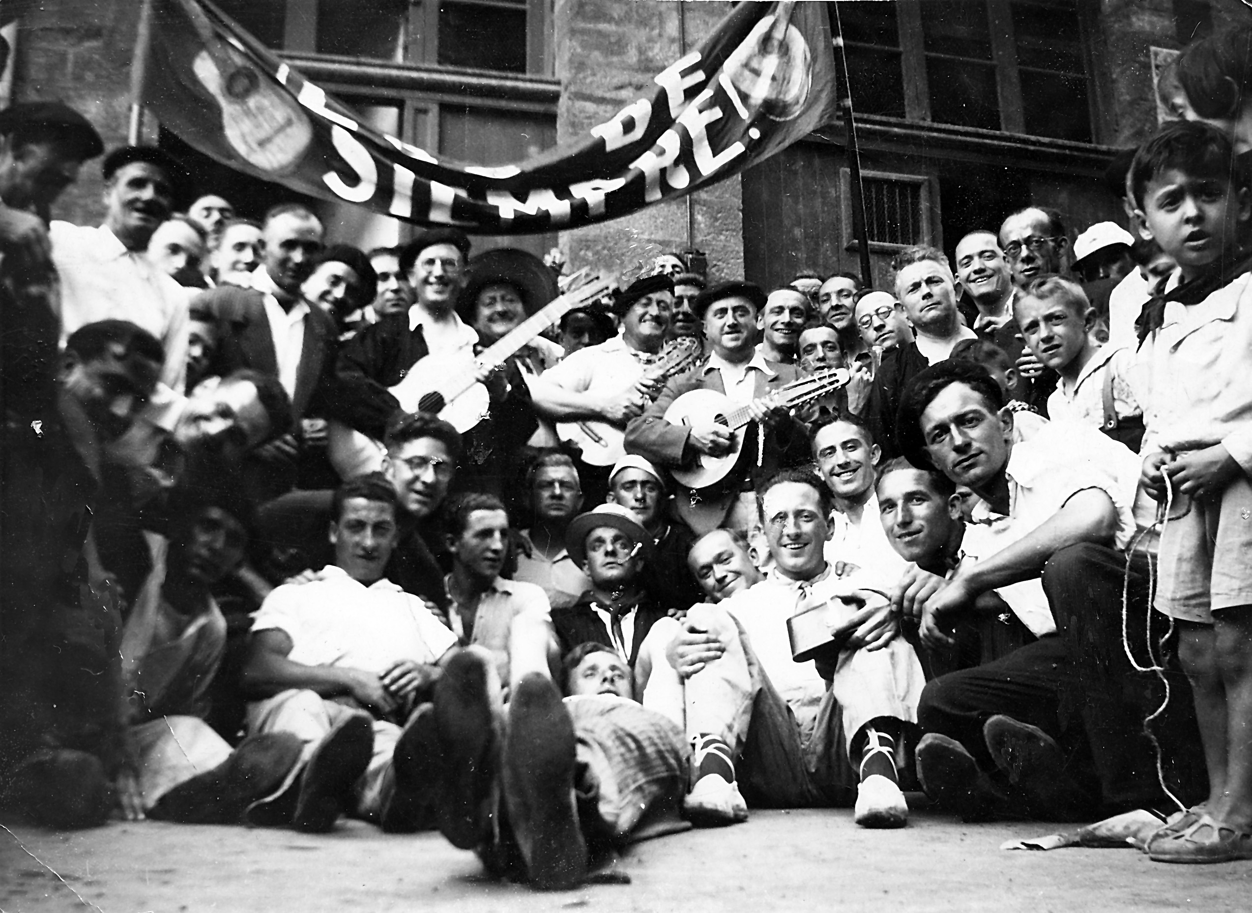 La cuadrilla "Los de Siempre" en Pamplona durante los sanfermines de 1928. Los hermanos Calvete son los con instrumentos, de izquierda a derecha, Isidoro, Demetrio, Babil.